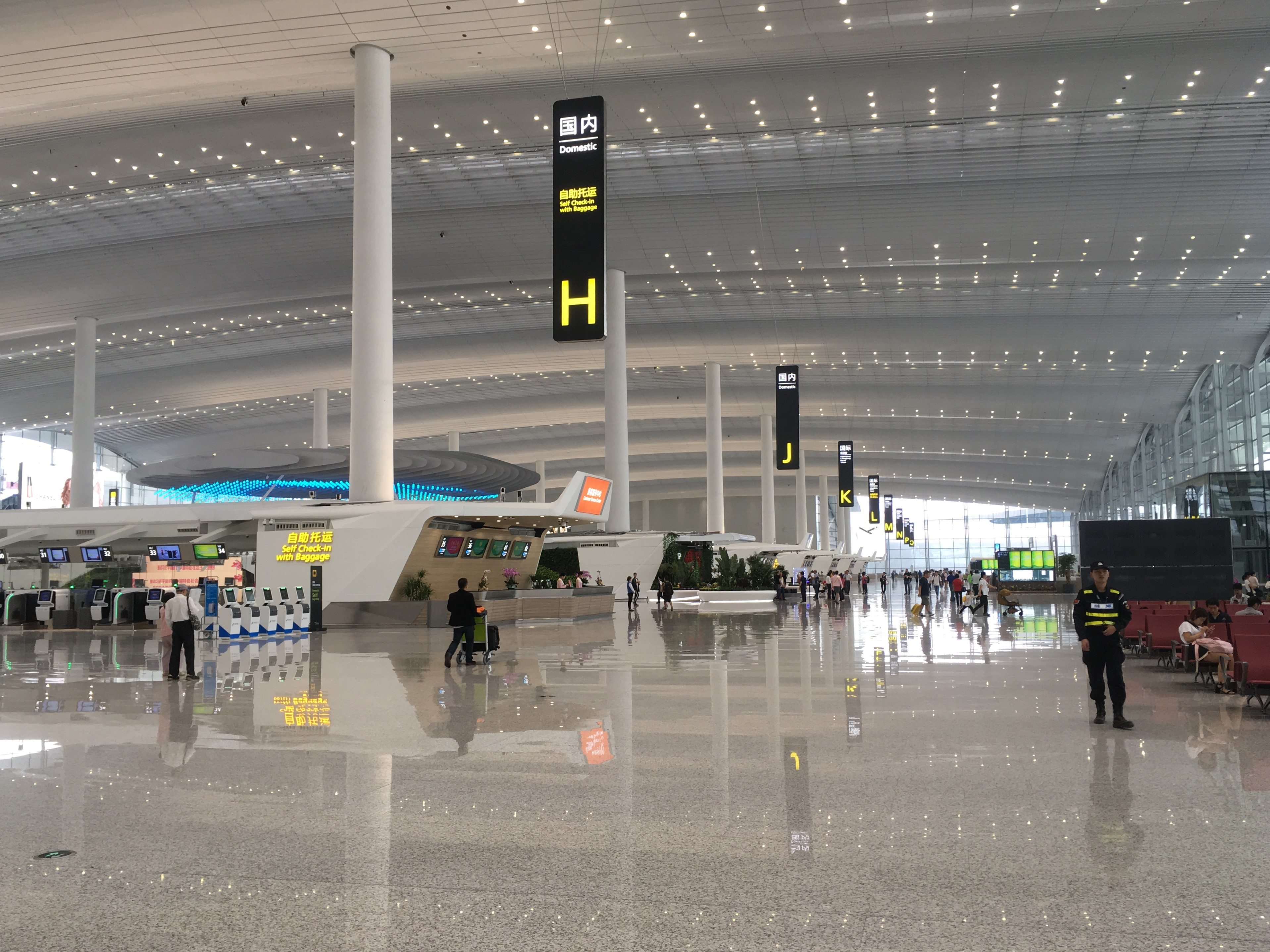 廣州白雲國際機場二號航站樓出發大堂